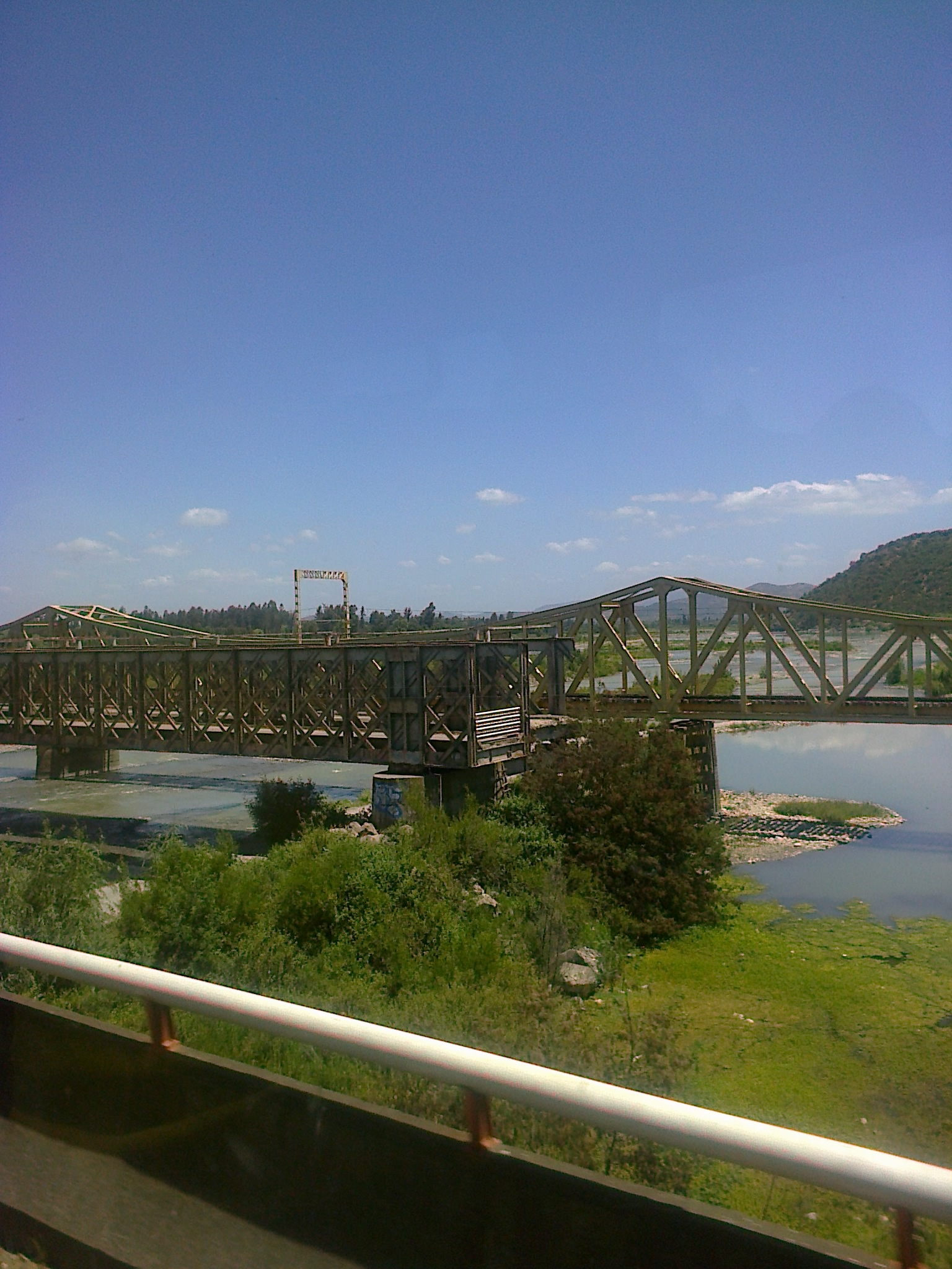 Al frente: puentes viales sobre el río Maule. Al fondo: puente ferroviario This is a photo of a national monument in Chile: 393 This is a photo of a national monument in Chile: 394